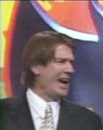 2001 год. Юбилейный концерт группы Цветы. Песня "Мы желаем счастья вам". На фото Александр Абдулов